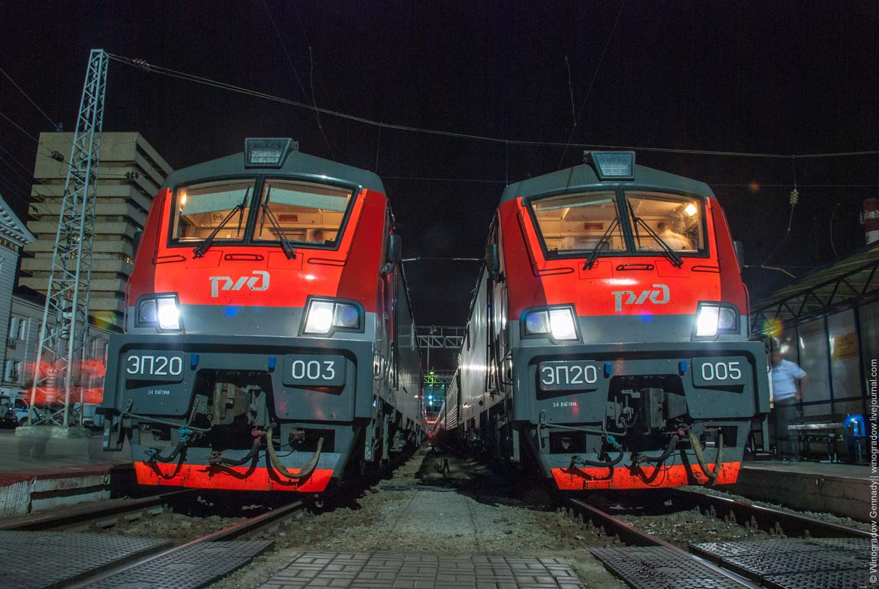 Пассажирский электровоз ЭП20 на станции Ростов-Главный.